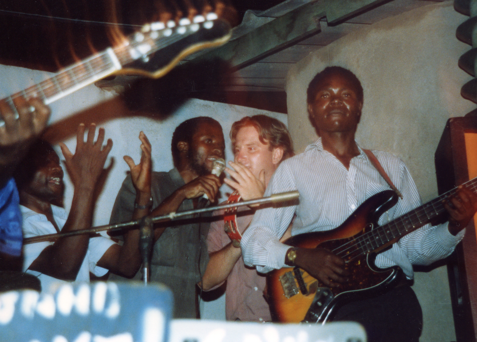 Musicians playing Zimbabwean pop music, Danga, Mberengwa, Zimbabwe. geotagged